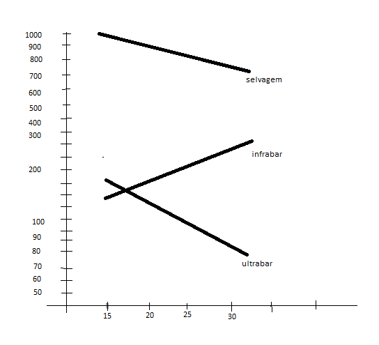 grafico norma de reação dos olhos de Drosophila. Dimensões:1914x936.